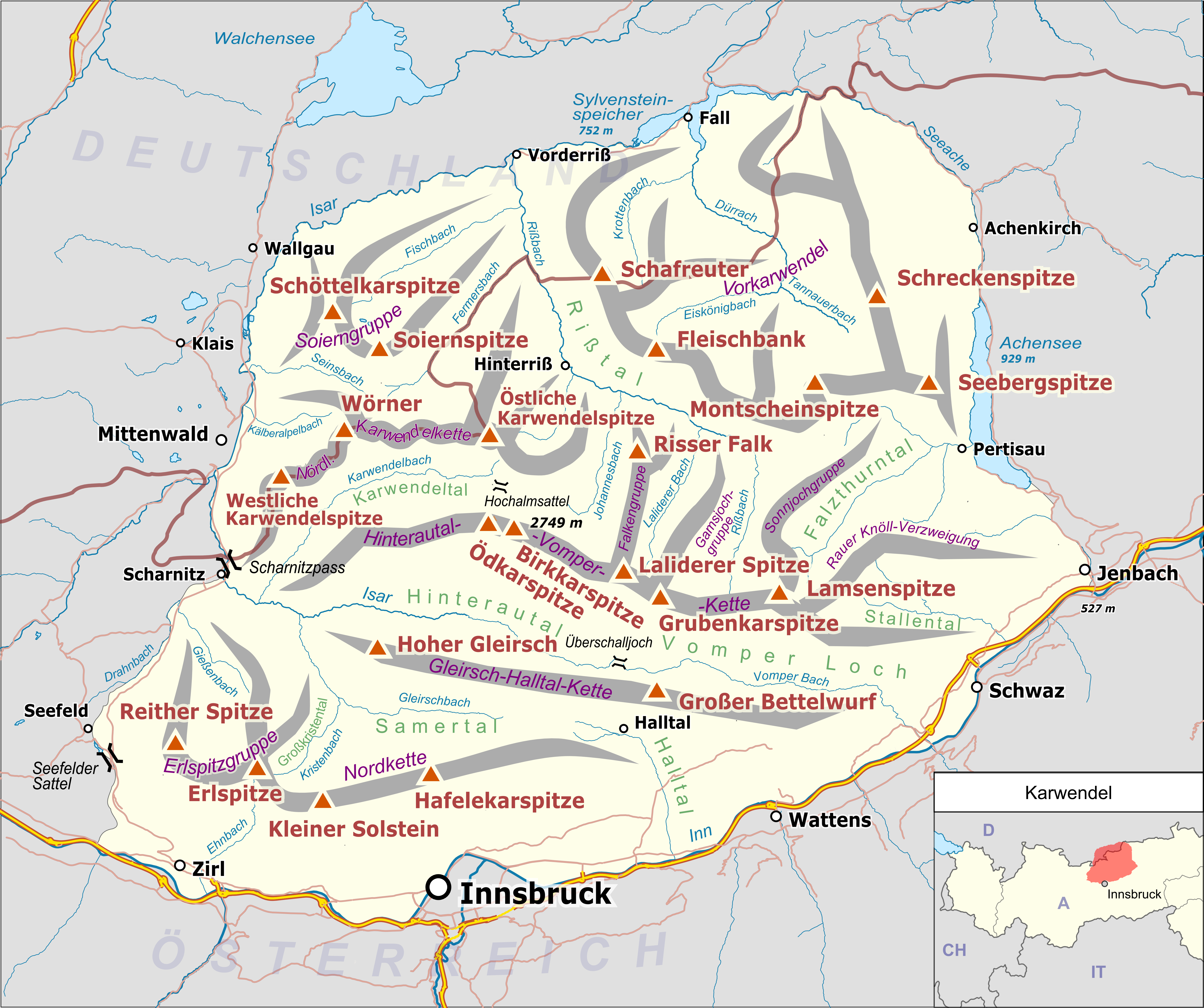 Übersichtskarte des Karwendels.